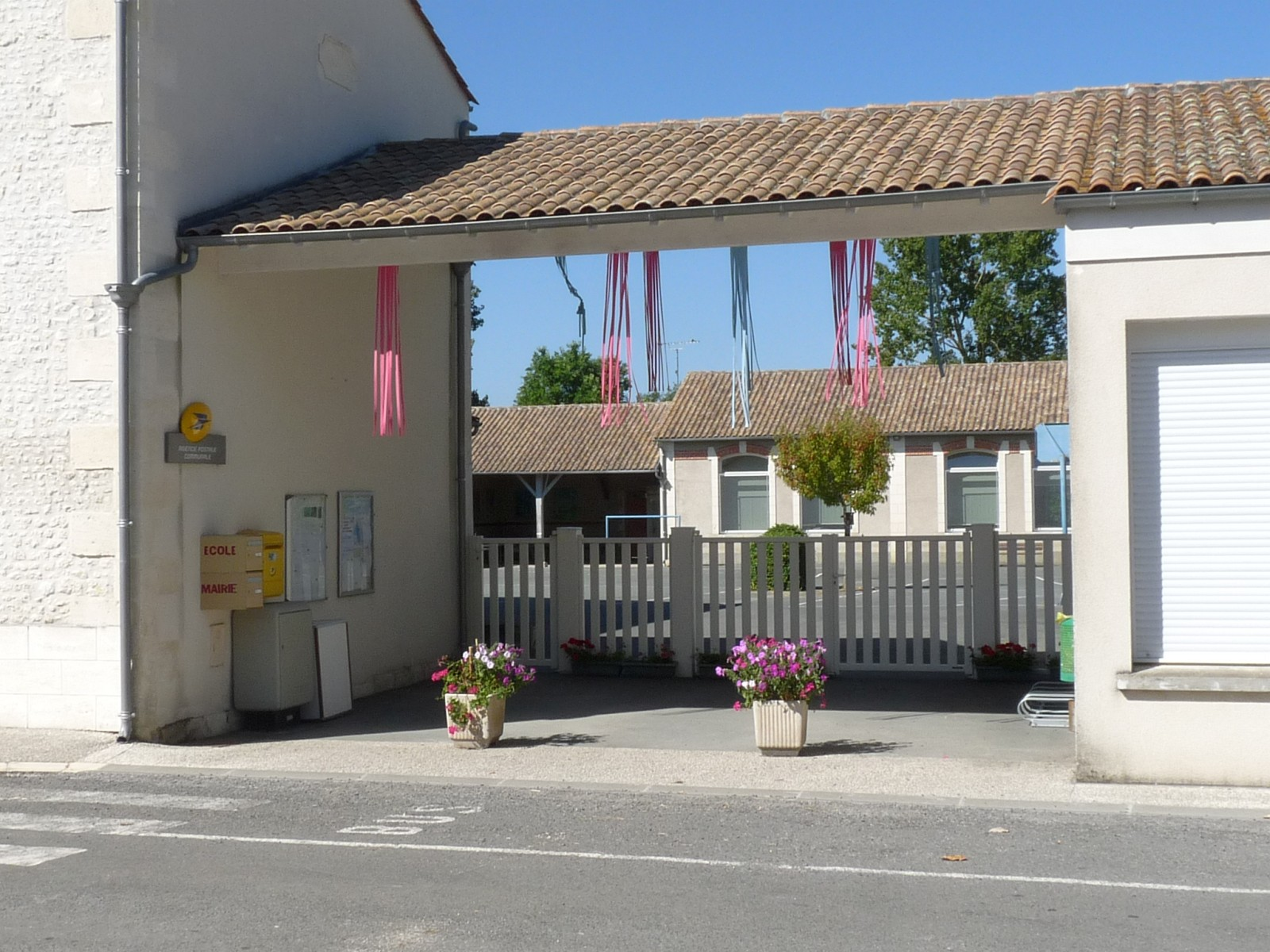 Ecole de St-Ciers-Champagne, Charente-Maritime, France